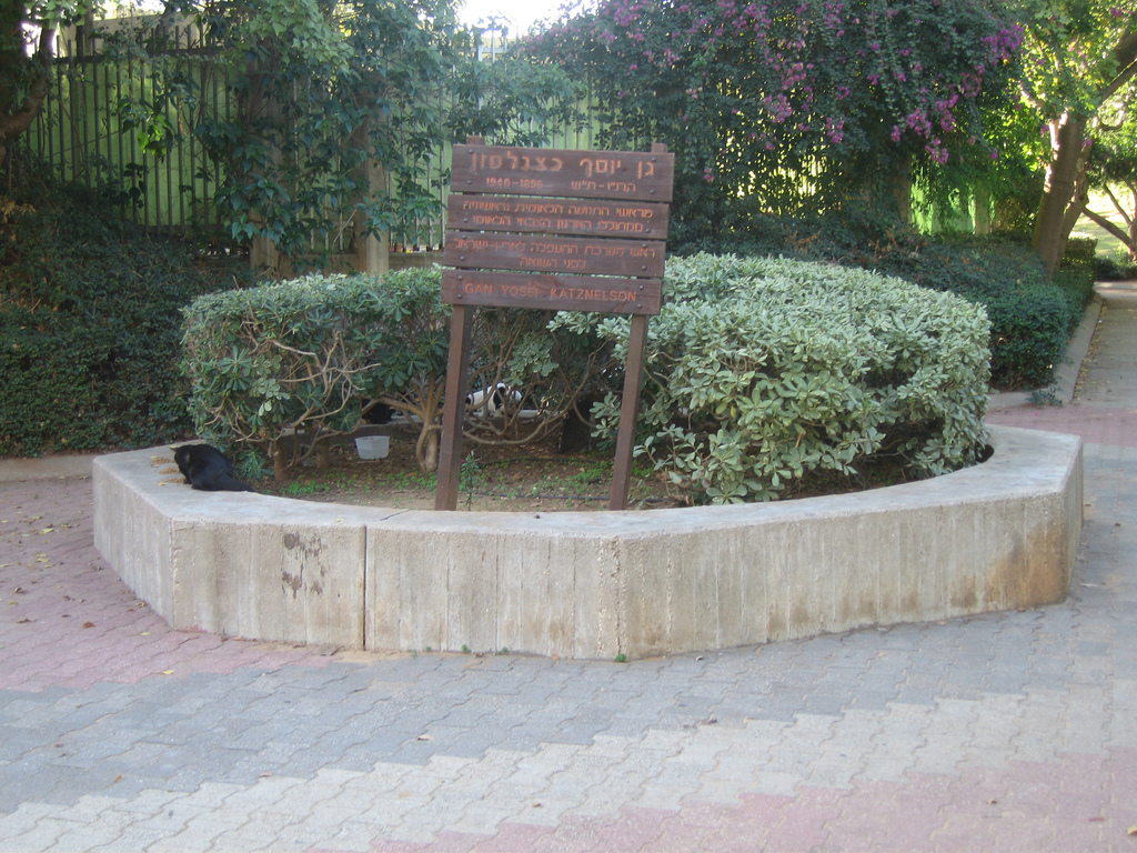 Yosef Katznelson Garden, tel Aviv, Israel